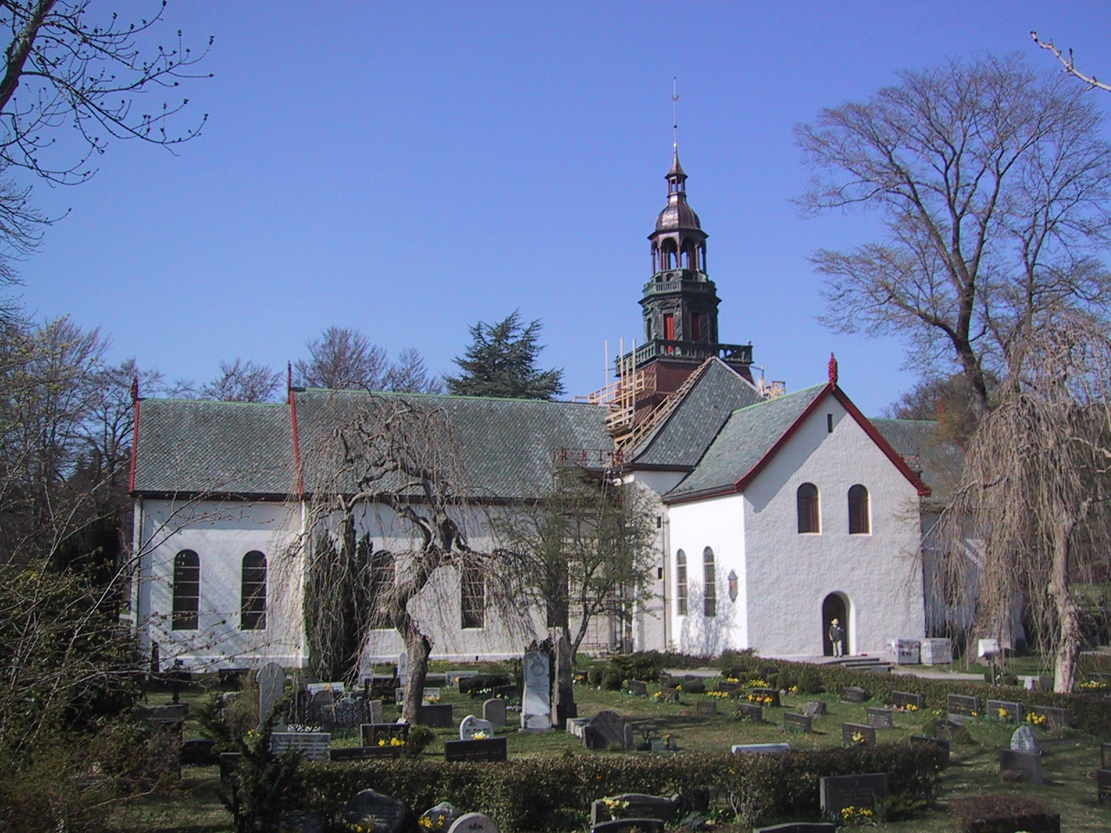 Borgund kyrkje sett frå sør